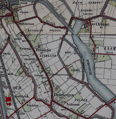 Zuidlandpolder